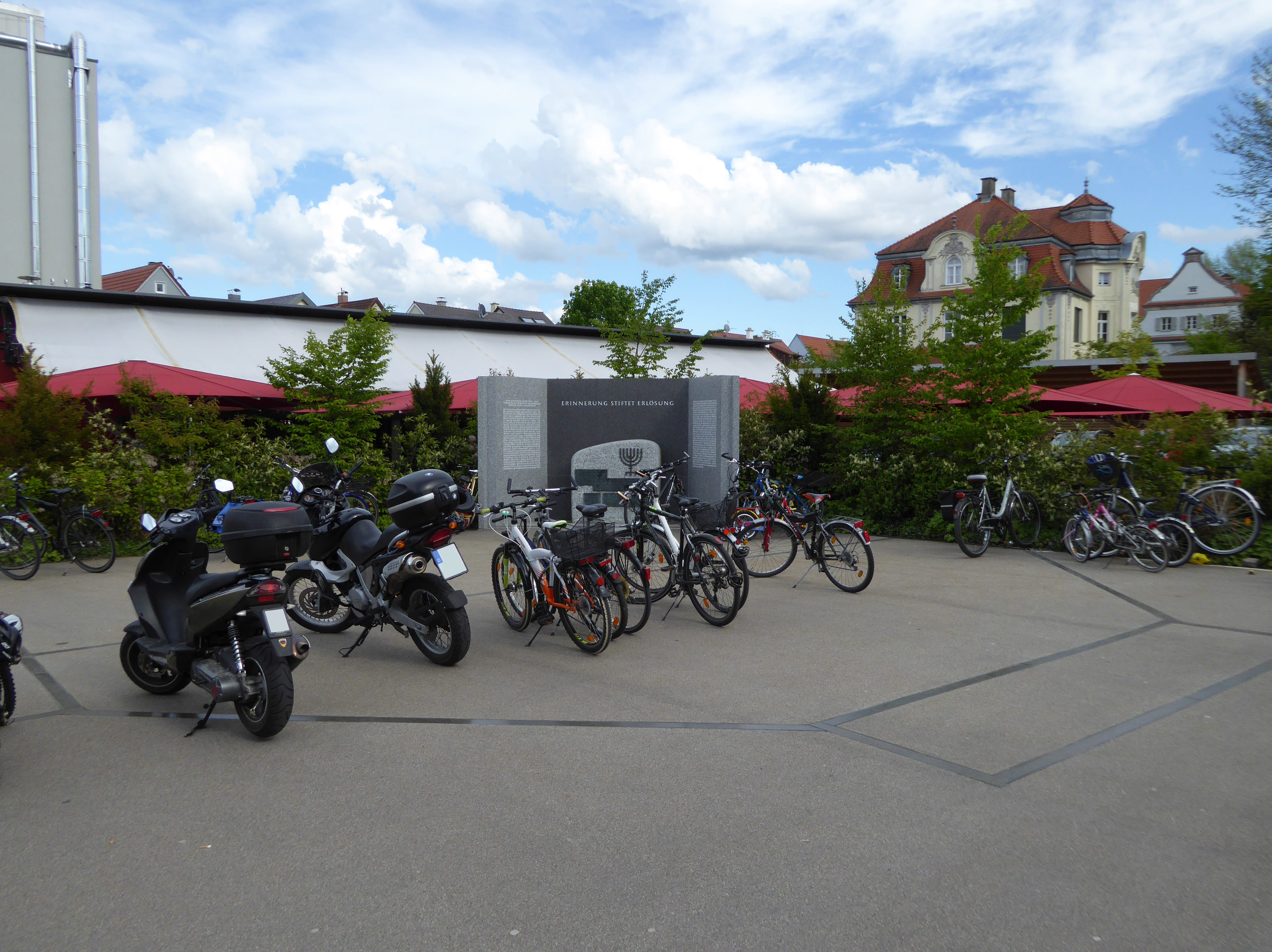 Gedenkstätte für die zerstörte Synagoge am Schweizerberg in Memmingen